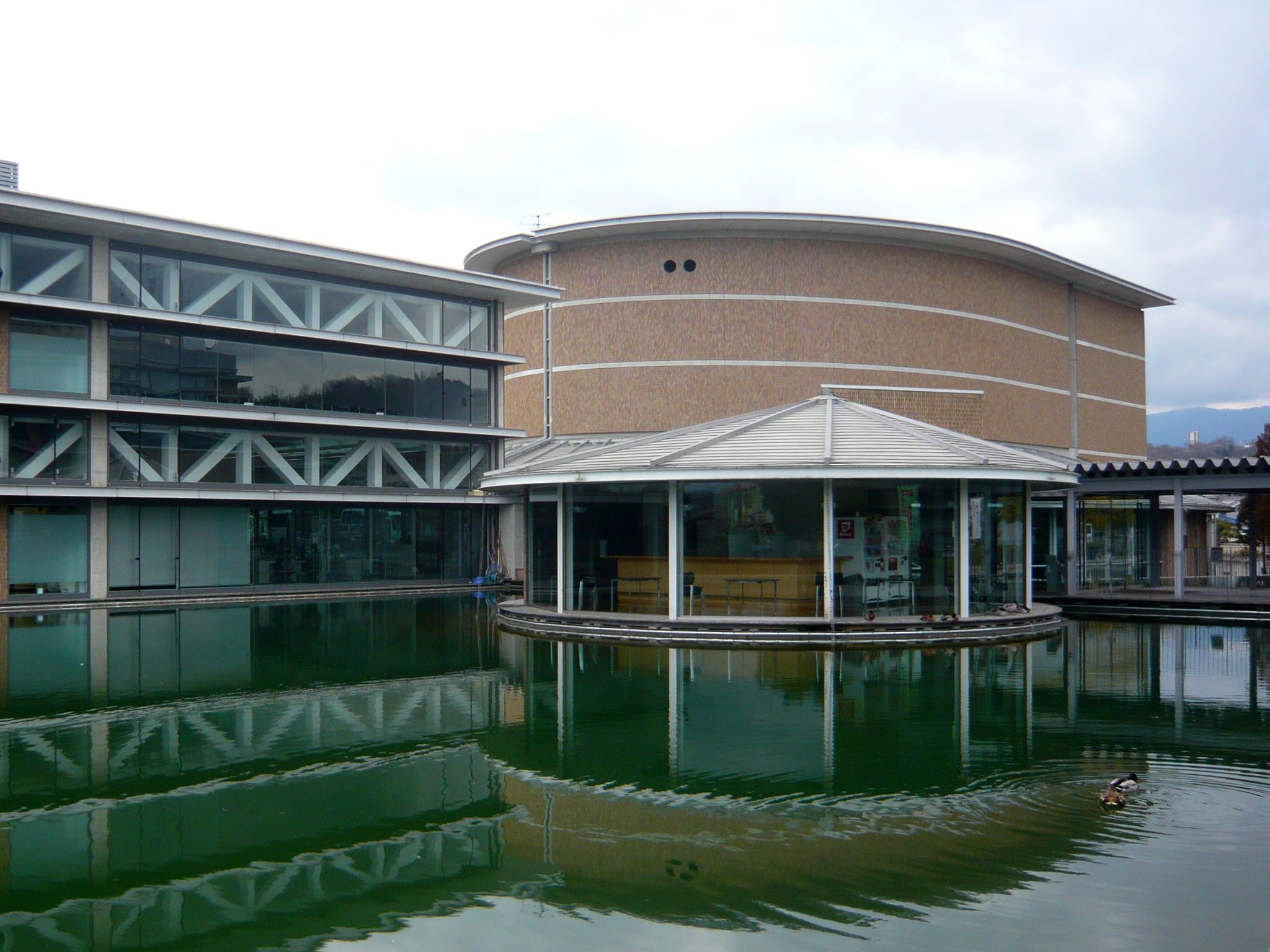 大淀町文化会館 Ōyodo-chō cultural hall